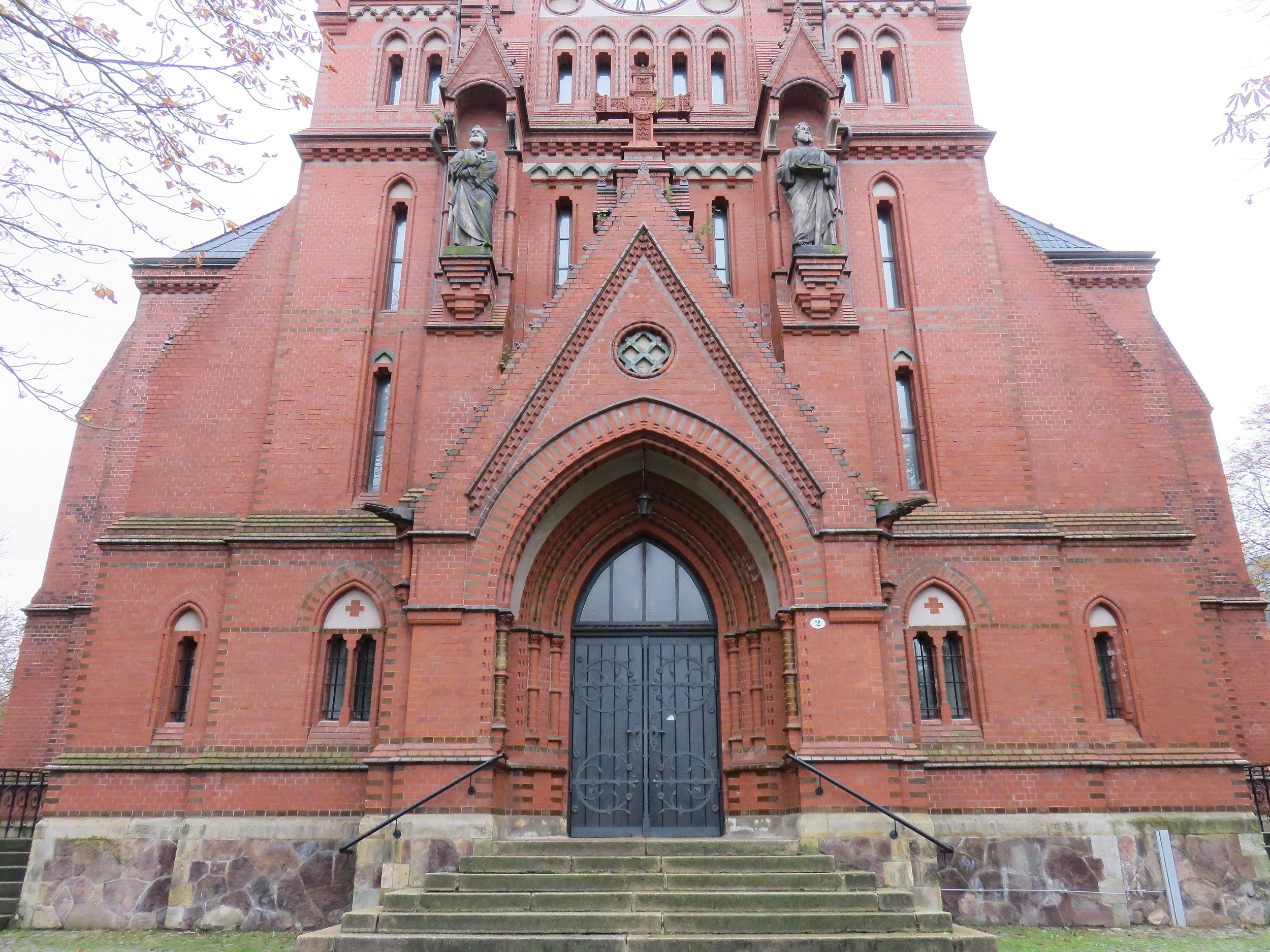 Evangelisch-Lutherische Andreaskirche an der Pfarrstraße 2 in Chemnitz Gablenz. Kulturdenkmal Chemnitz Gablenz.